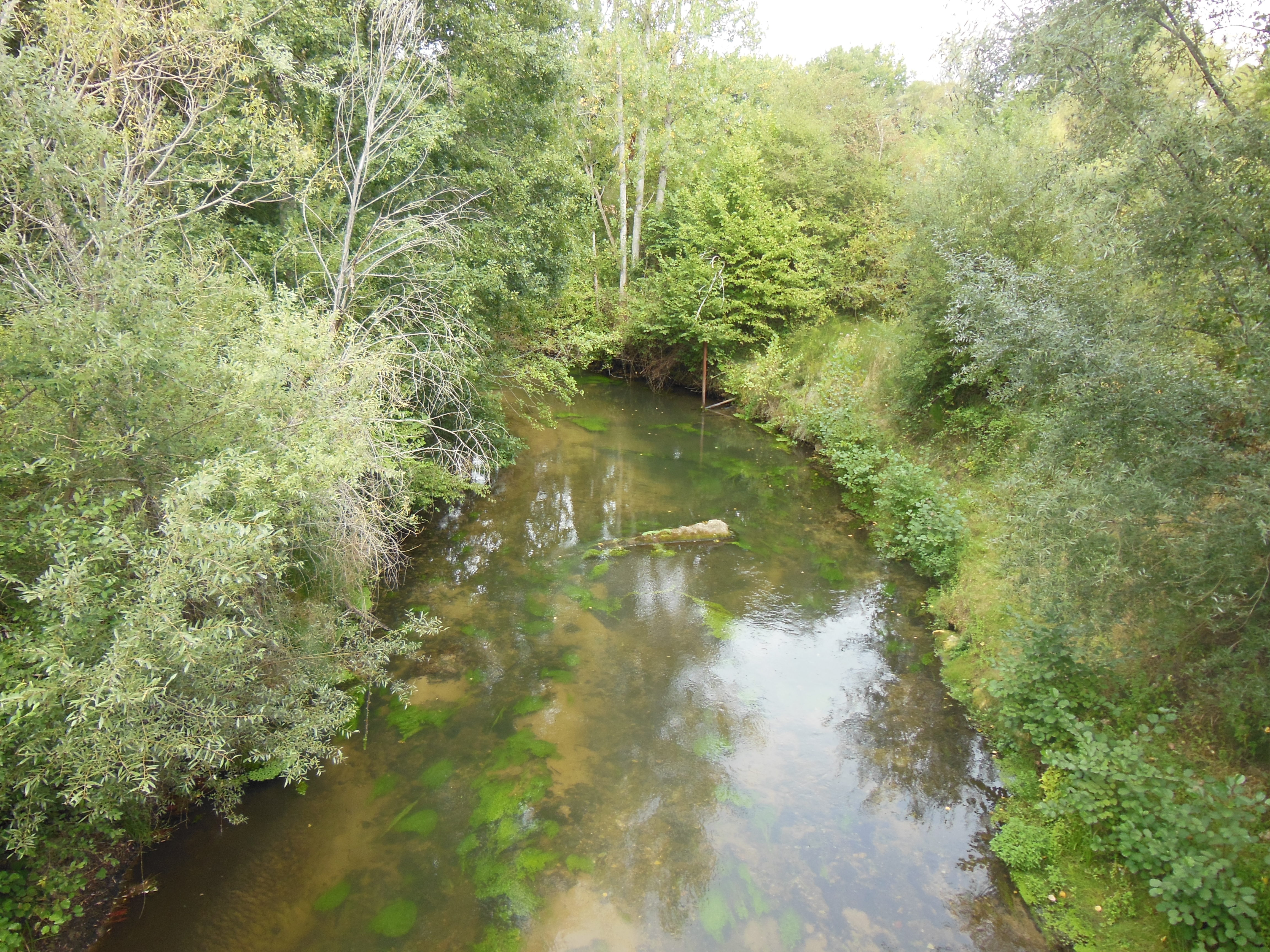 Rivière Estampon à Arue, dans le département français des Landes